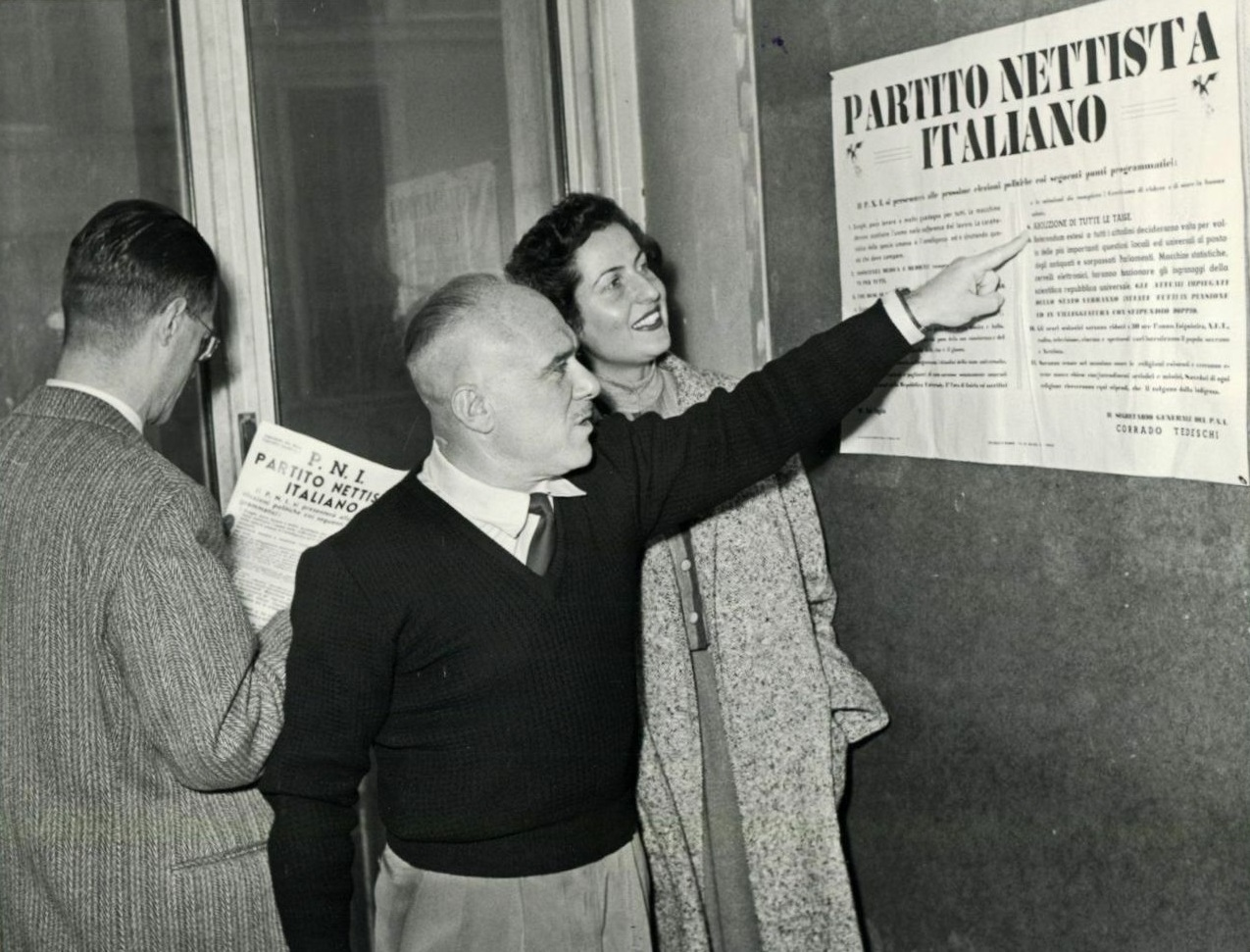 Corrado Tedeschi indica il programma del Partito Nettista Italiano (noto come "Partito della Bistecca") in occasione delle elezioni politiche del 1953